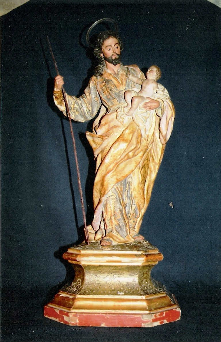 San José, de Francisco Salzillo, perteneciente a la iglesia de Chinchilla